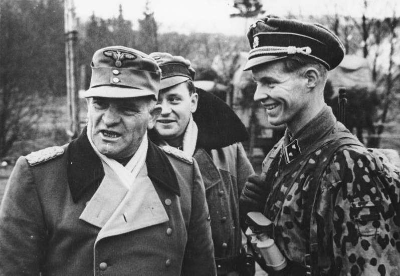 Sepp Dietrich Scherl Bilderdienst: Sepp Dietrich bei seinen Grenadieren Brillantenträger Oberstgruppenführer und Generaloberst der Waffen-SS Sepp Dietrich ist mit seinem Volkswagen auf allen Strassen anzutreffen, auf denen seine Grenadiere marschieren. 19.1.45 [Herausgabedatum] Aufnahme: Roeder Abgebildete Personen: Dietrich, Joseph (Sepp): Generaloberst, Ritterkreuz (RK), SS-Oberstgruppenführer, Leibstandarte, Deutschland (GND 11888932X) Information added by Wikimedia users.in centre, Hermann "Bibl" Weiser (?)